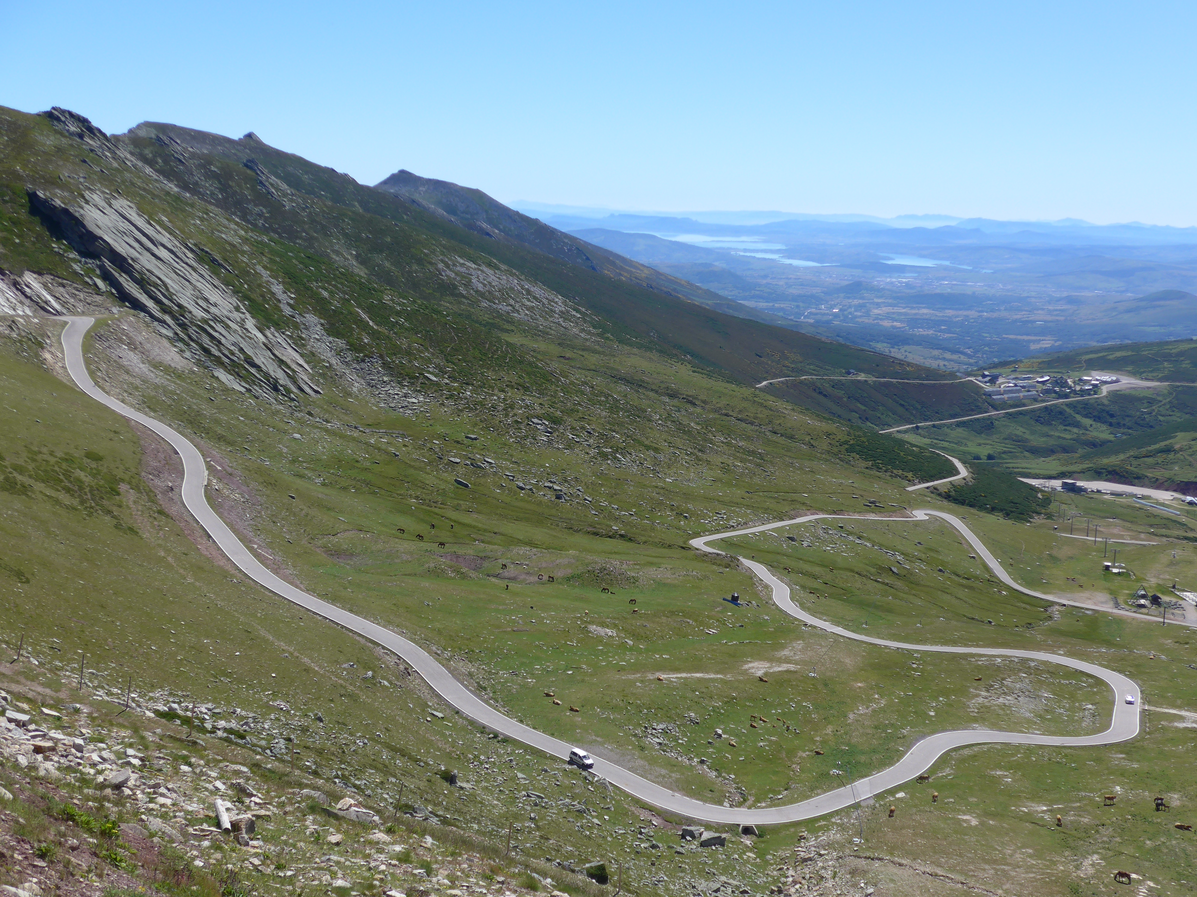 El collado-mirador de la Fuente del Chivo (1992 msnm) constituye la carretera asfaltada más elevada de toda la Cordillera Cantábrica (CA-916). Este collado-mirador se localiza en Cantabria, entre la sierra del Cordel y la sierra del Híjar.